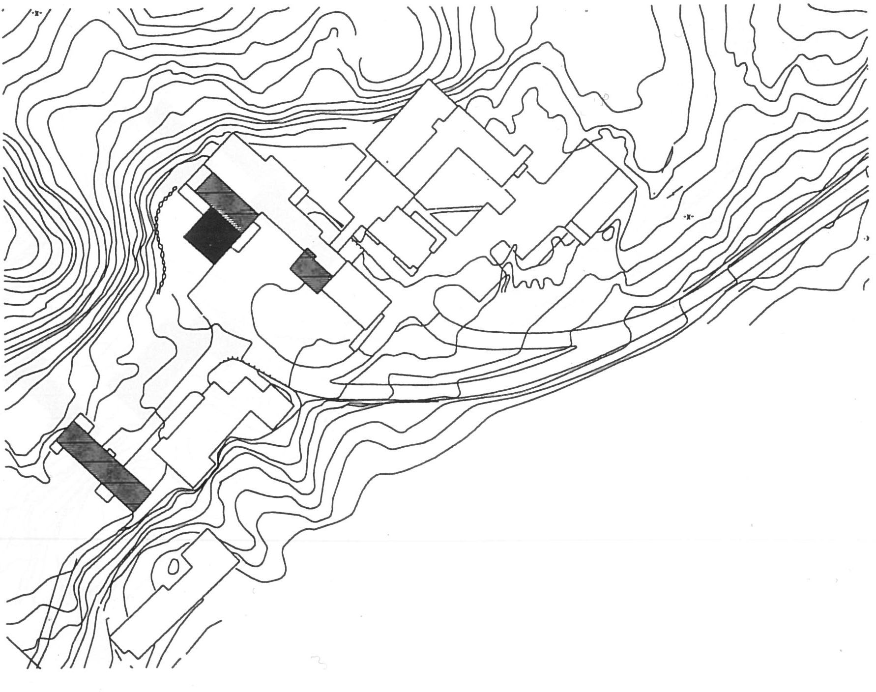 Lysebu plan 1918 arkitekt Astrup